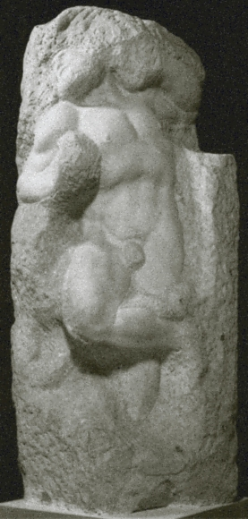 Michelangelo. Awakening slave